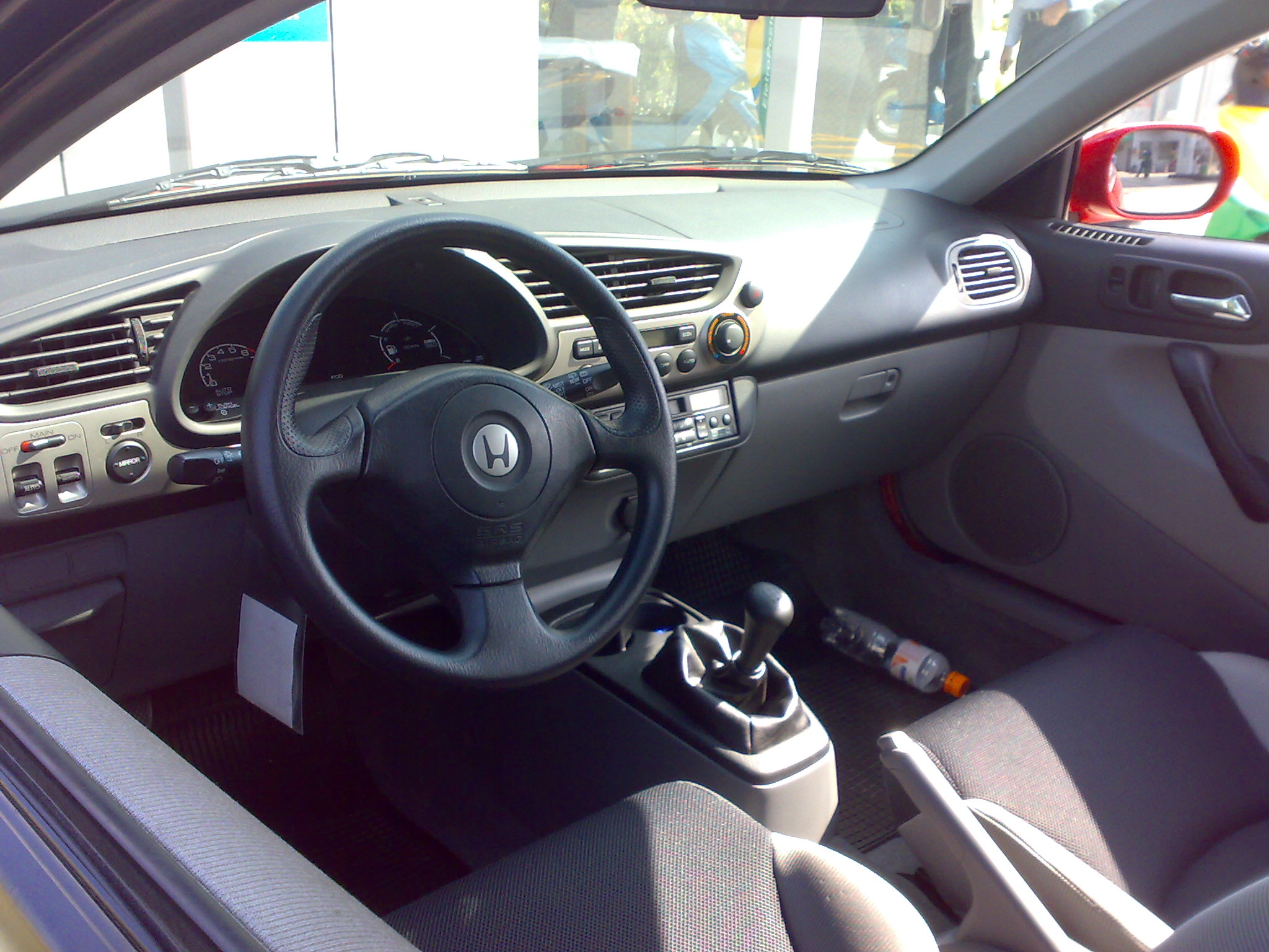 Honda Insight de primeira geração.